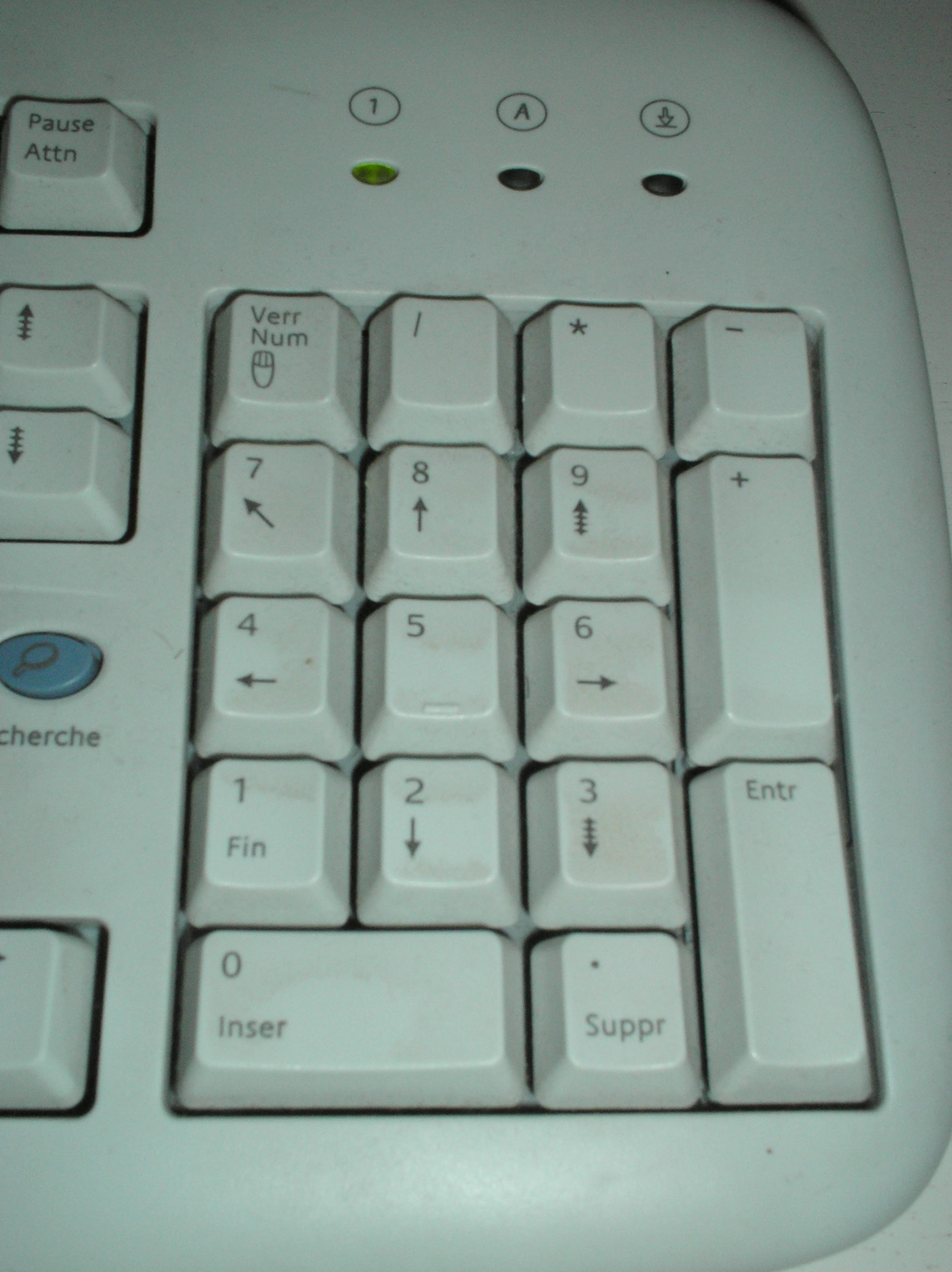 Photo d'un pavé numérique